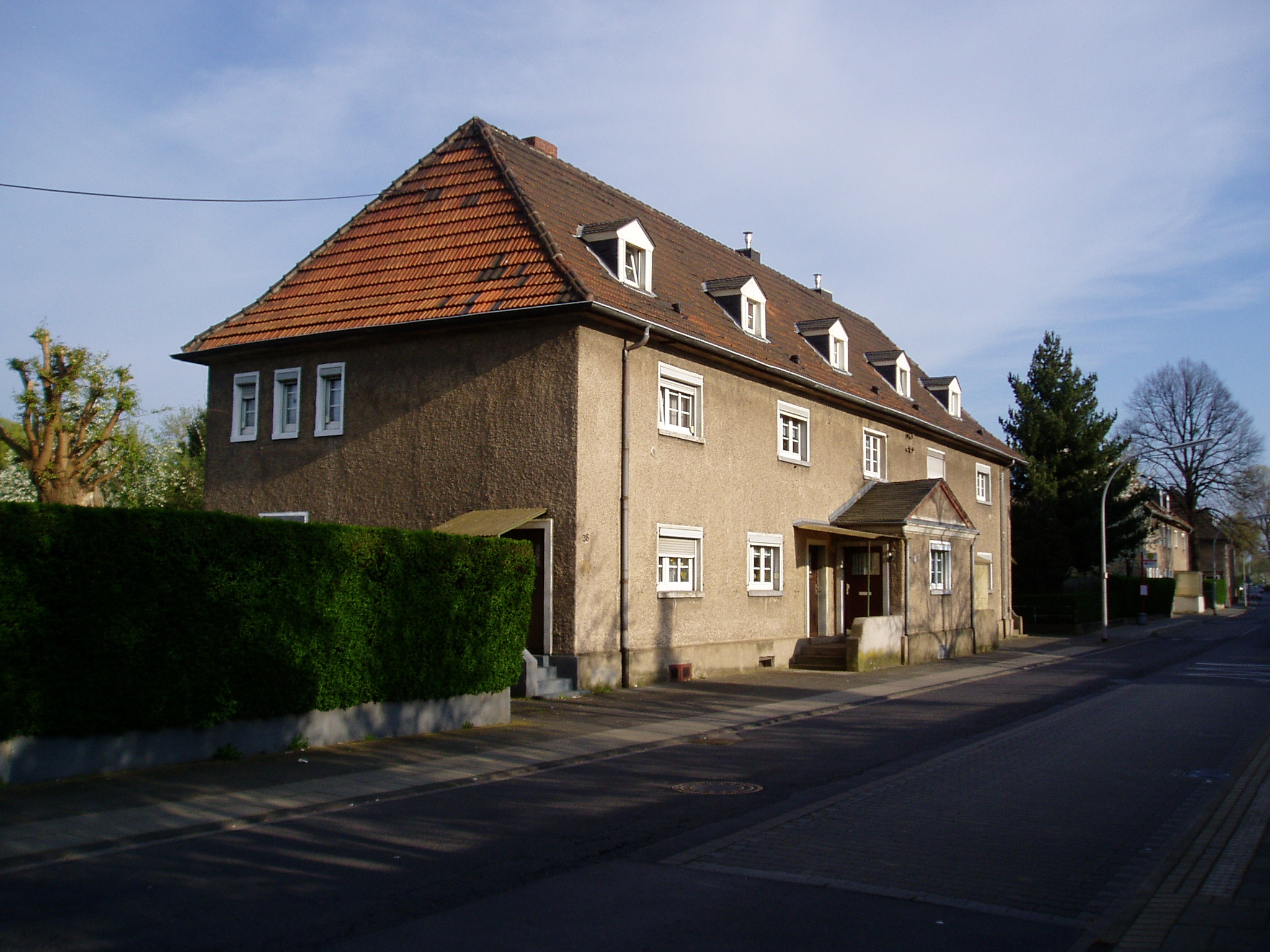 Köln-Gremberghoven , Eisenbahnsiedlung